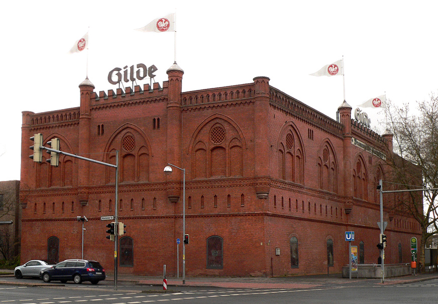 Gilde Brauerei in Hannover